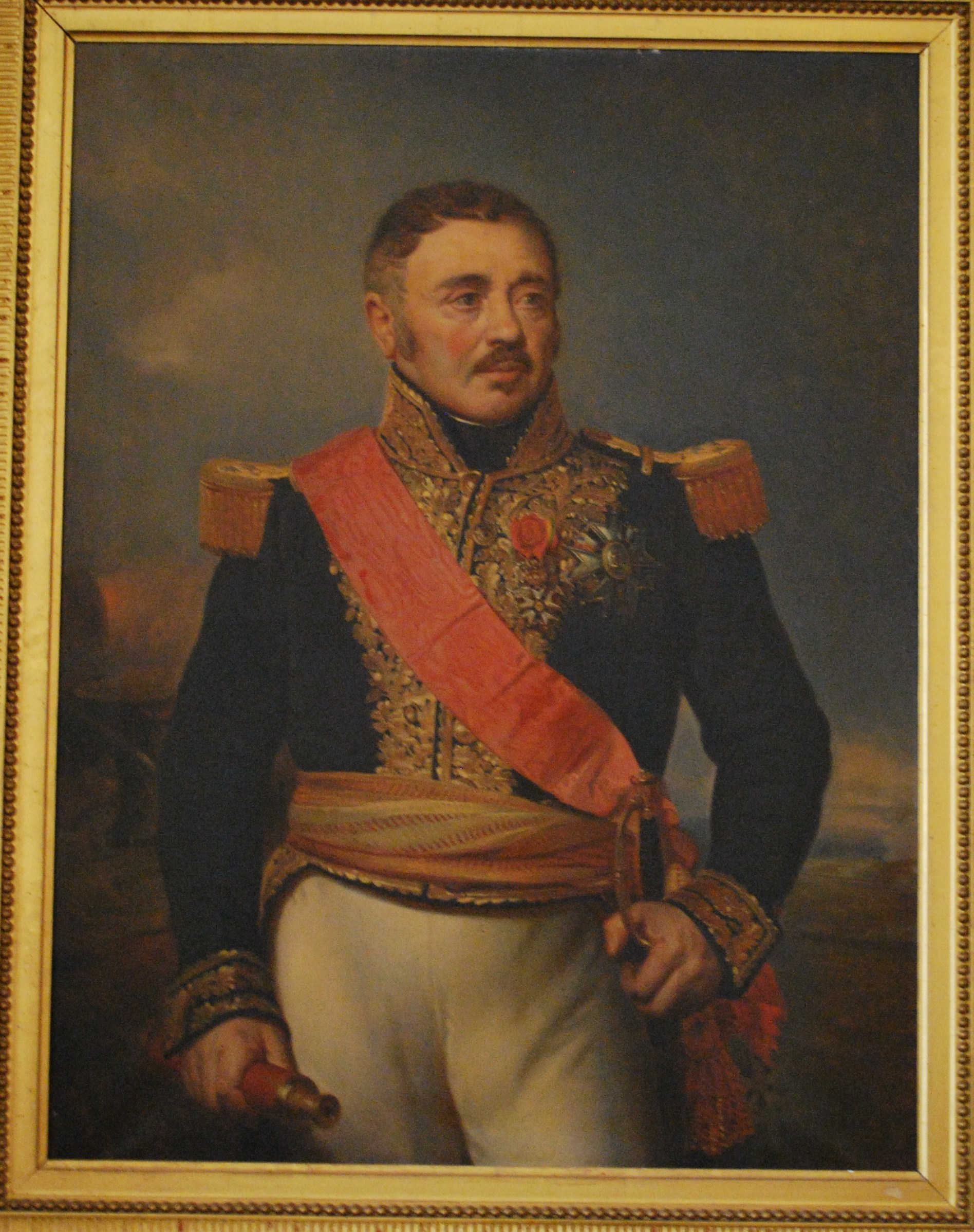 General Comte Pierre Barrois (1°Empire) né à Ligny en Barrois le 30/10/1774